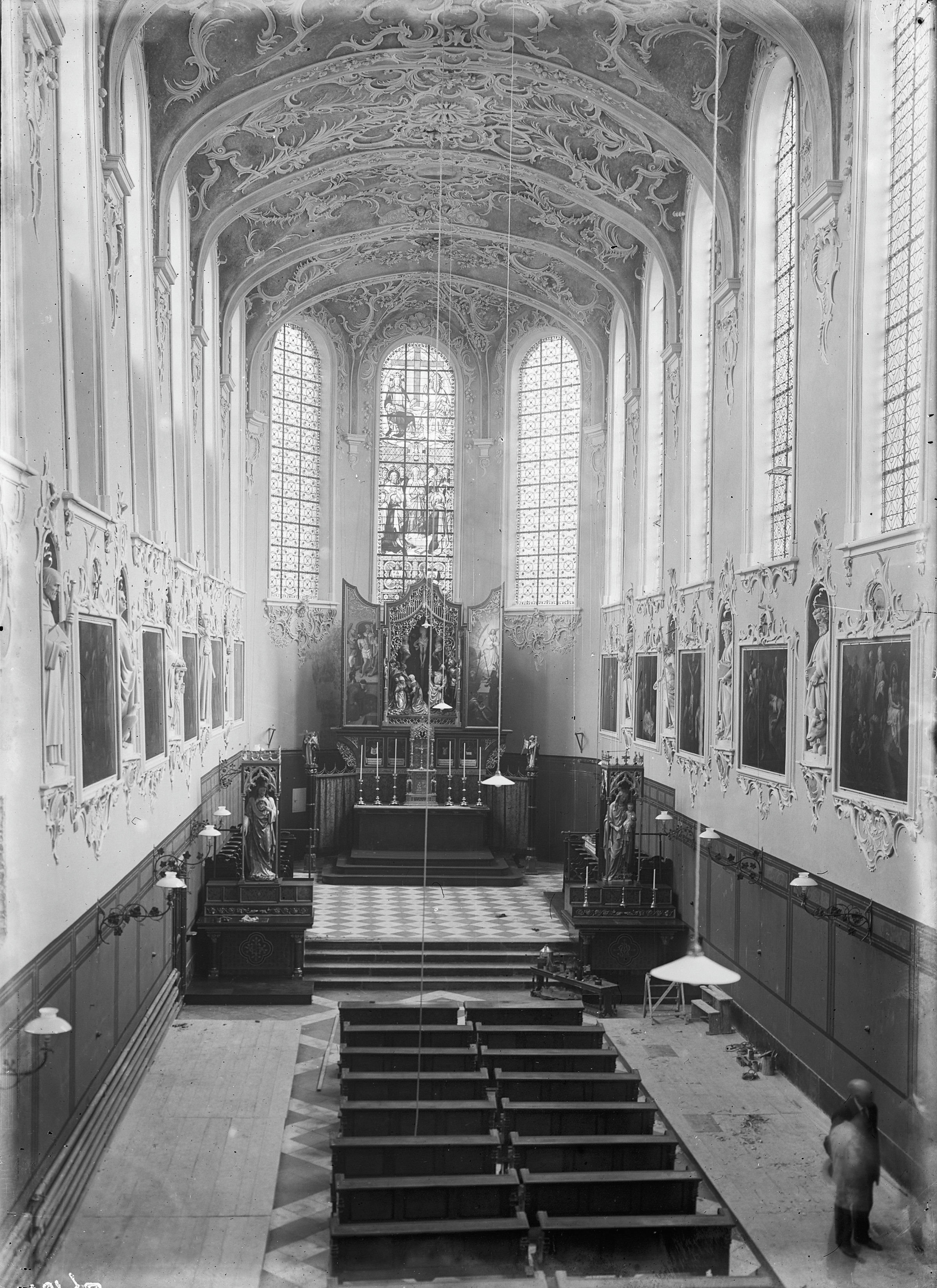 Voormalig Karthuizer Klooster (Groot Seminarium): stucwerk